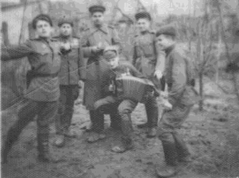 С боевыми товарищами. Весна 1944 года.